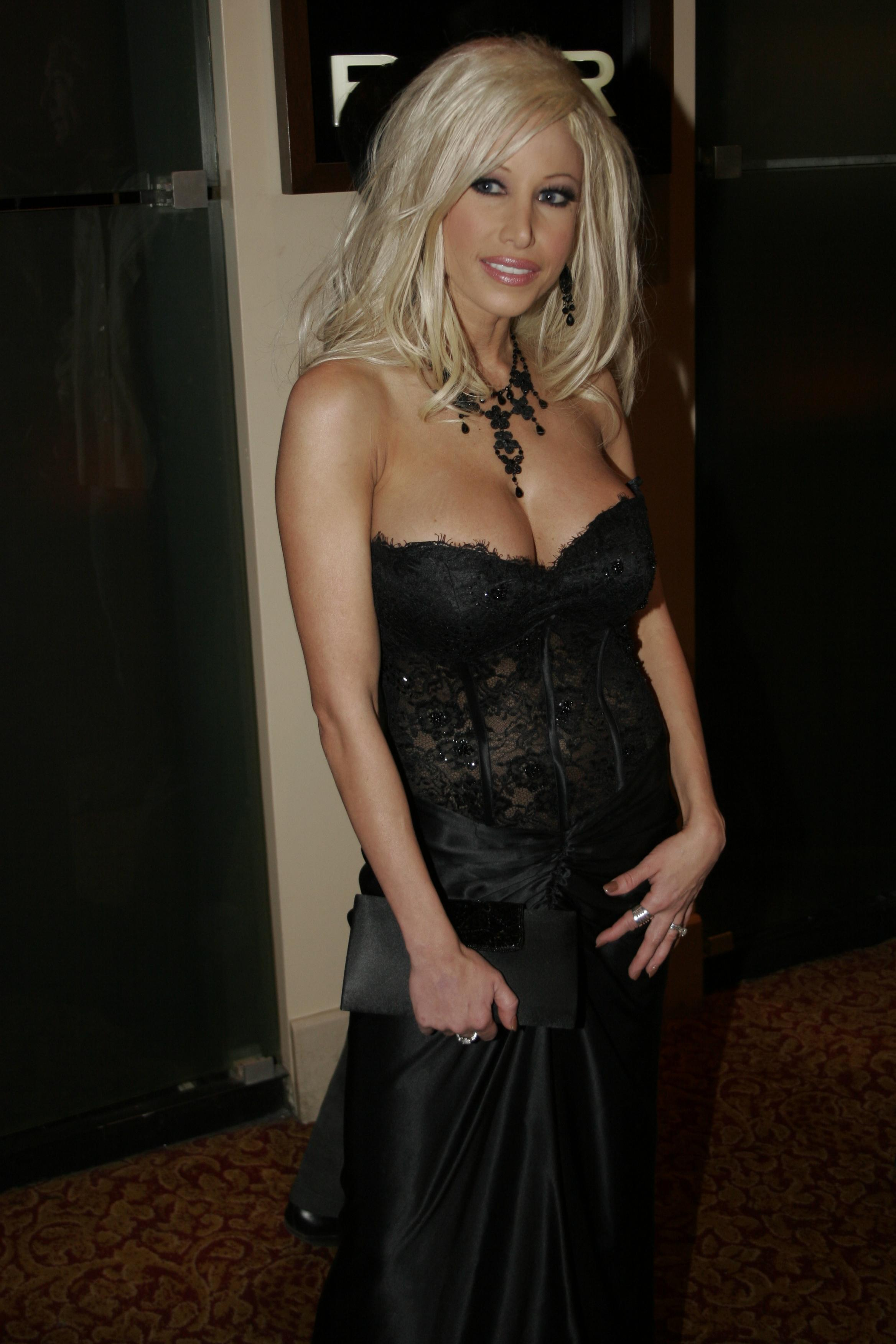 _MG_6214